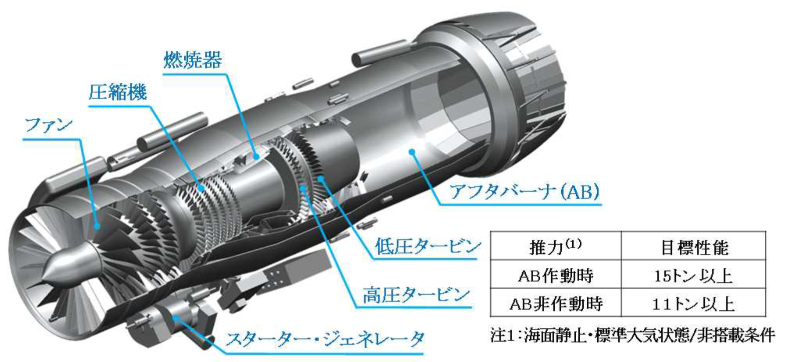 エンジン入口はファン３段、圧縮機６段で構成。防衛省の資料より写真のみ抜取